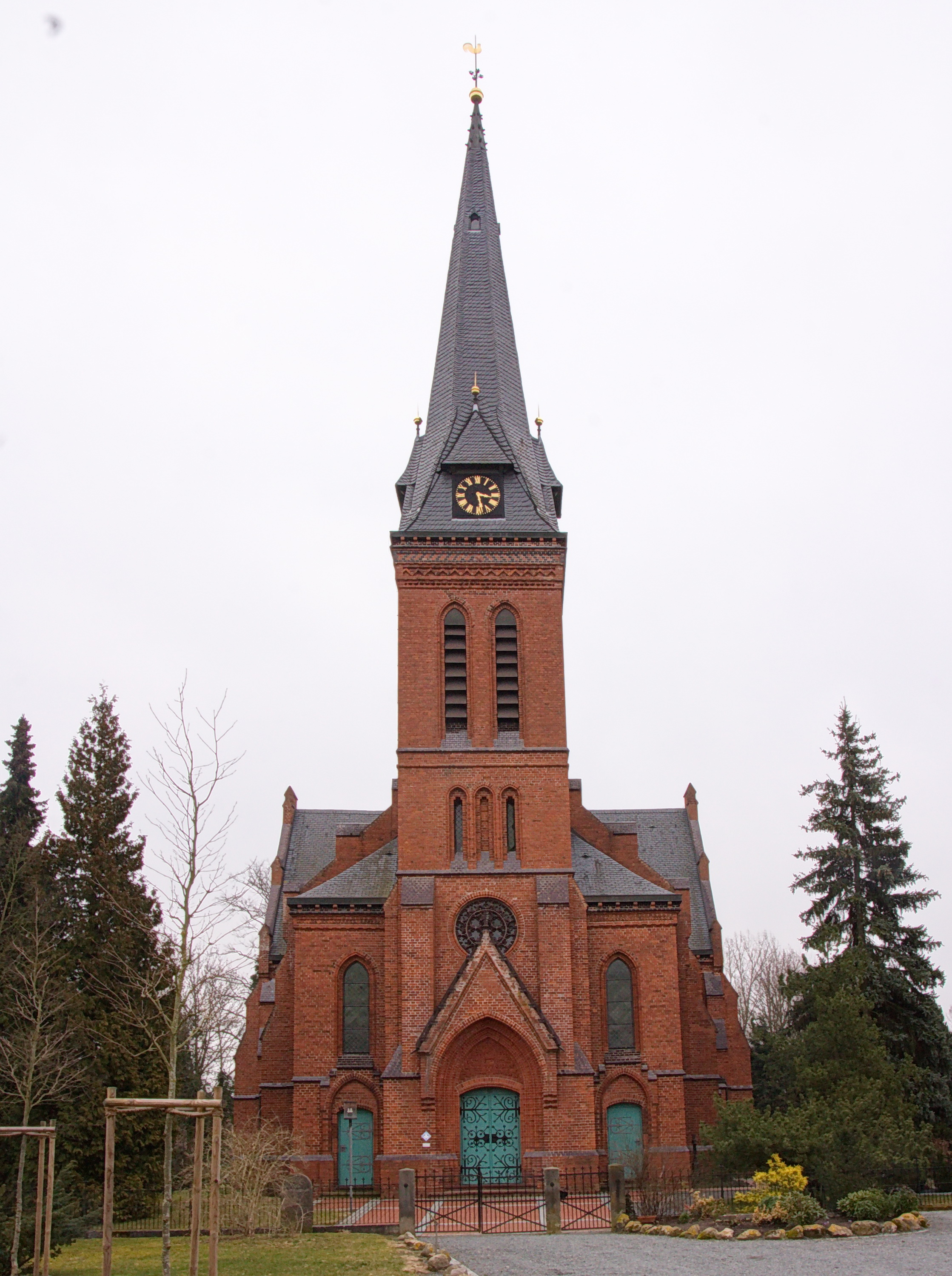 St.-Jakobi-Kirche in Wittlohe (Kirchlinteln), Niedersachsen, Deutschland